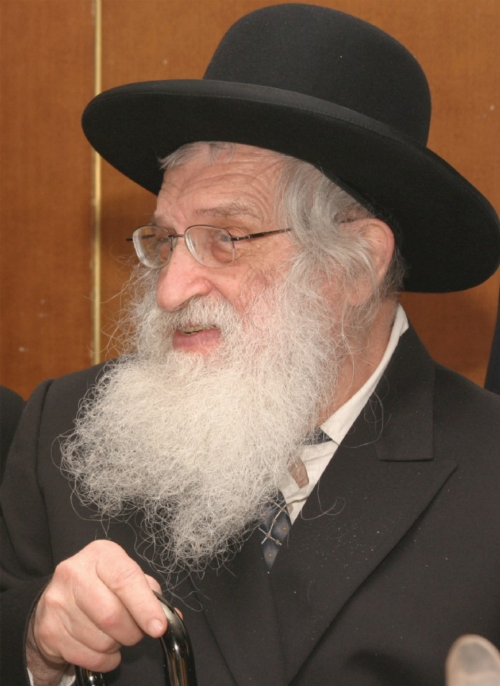 דב שוורצמן